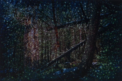 Val-Mingèr, CH 2015, b/w print, blueberry juice, 24 x 36 cm